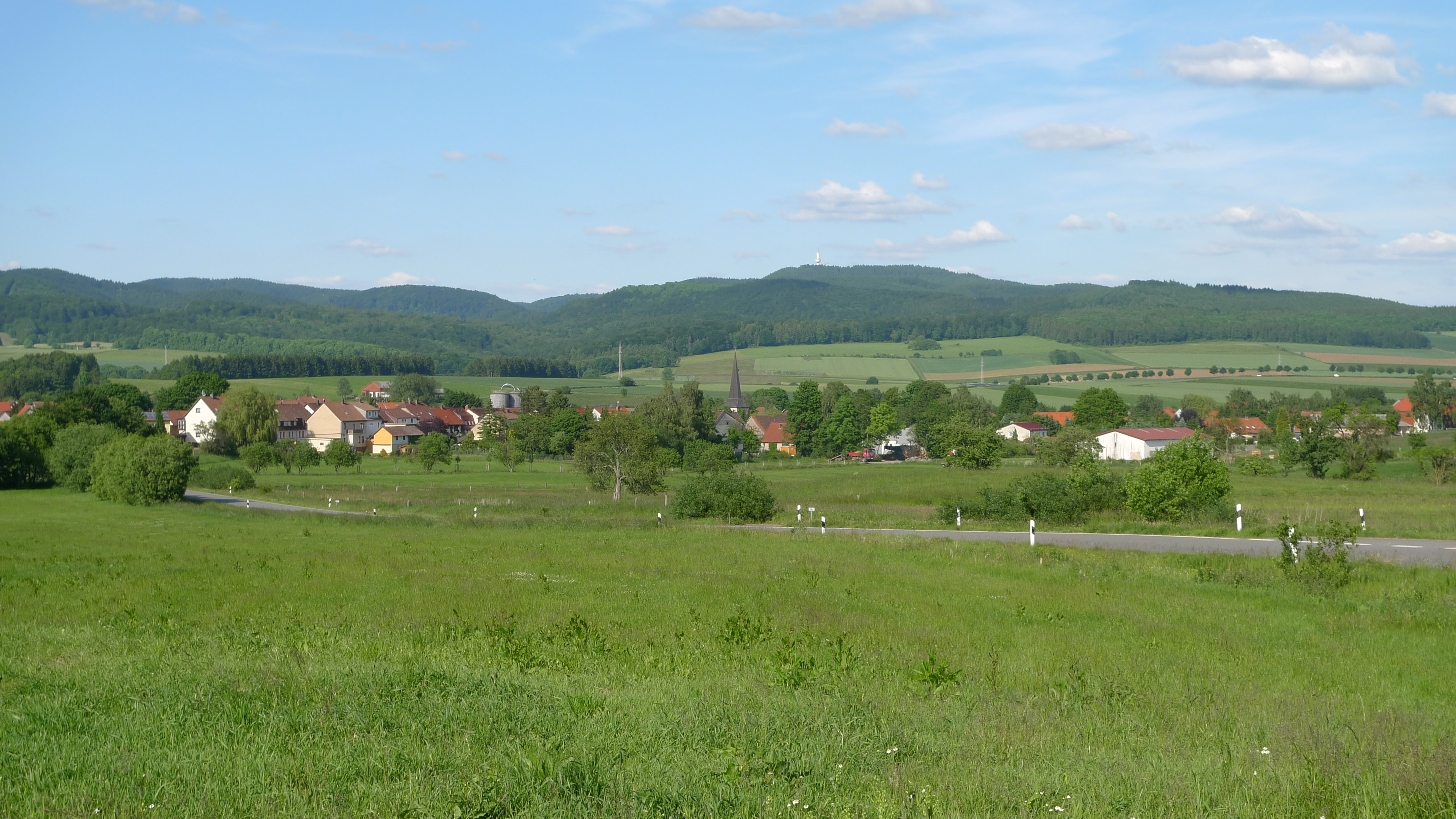 Blick von der ehemaligen Zonengrenze auf Bartolfelde, einem Ortsteil von Bad Lauterberg im Harz. Im Hintergrund der Ravensberg.